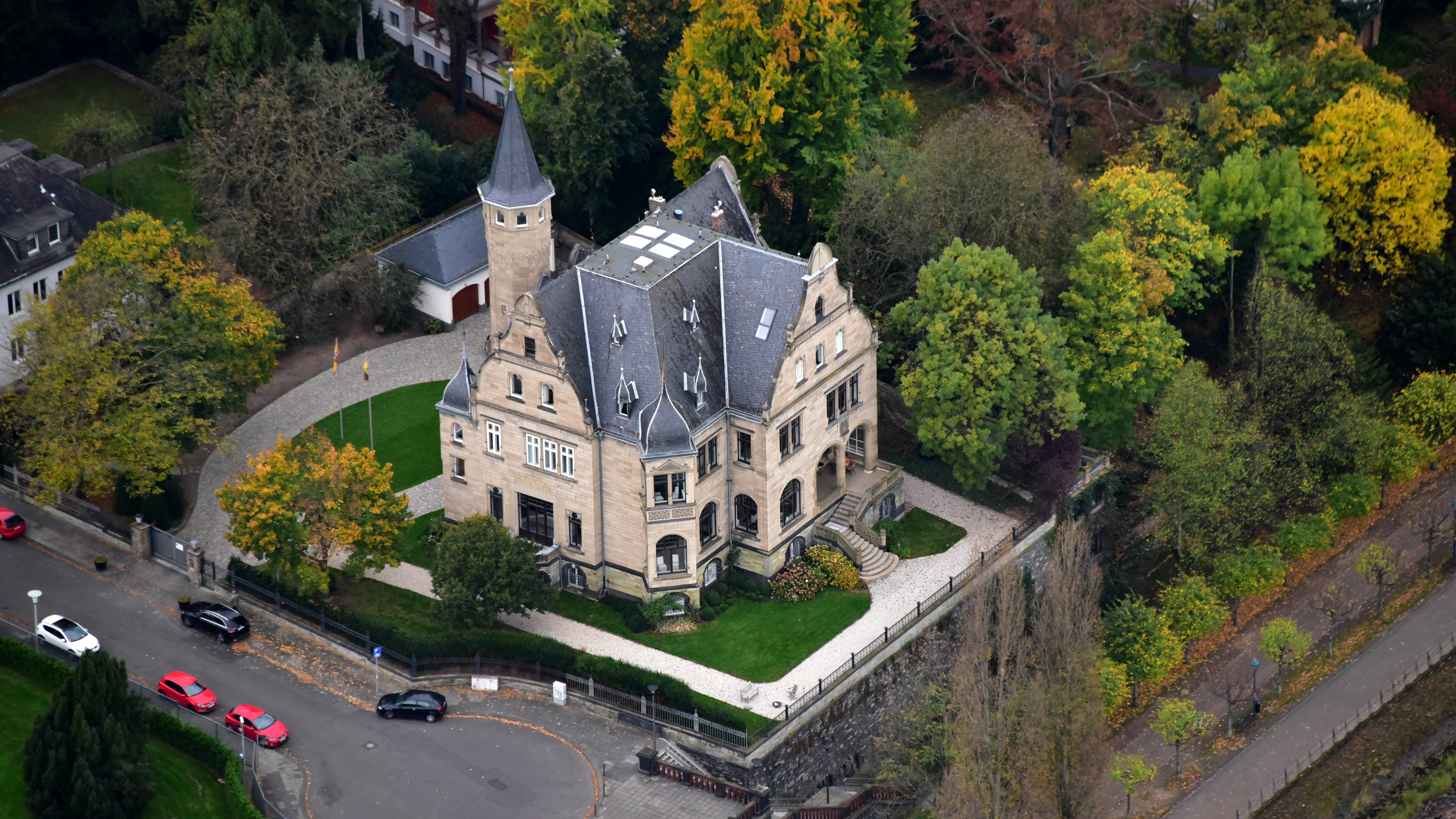 Bonn, Villa Spiritus, Luftaufnahme (2017)